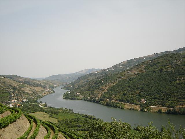 Rio Douro, Rio Duero, Duero river.